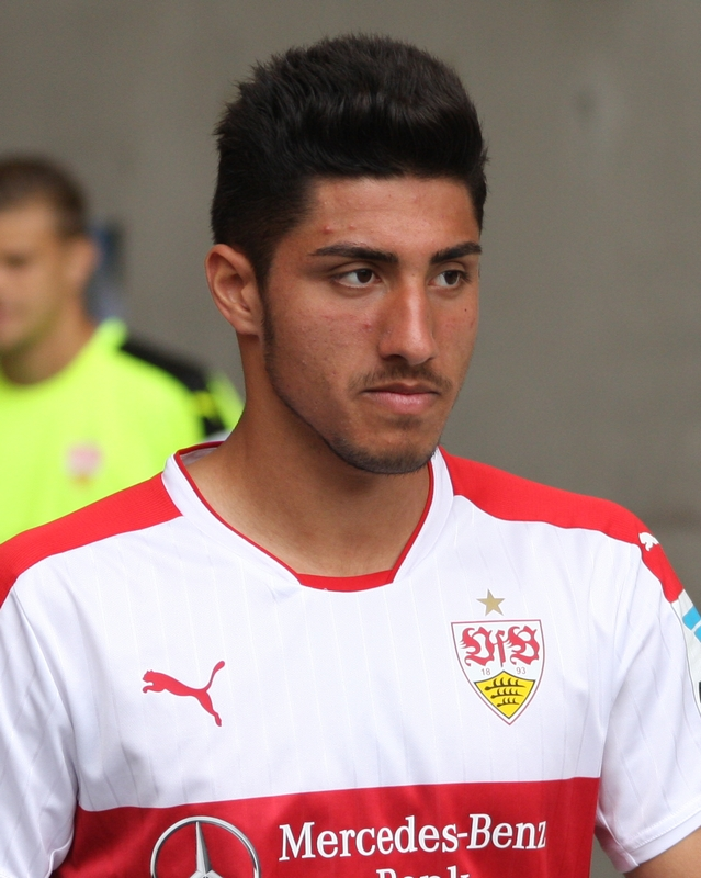 Berkay Özcan beim SaisonOpening 2016. Aufgenommen von